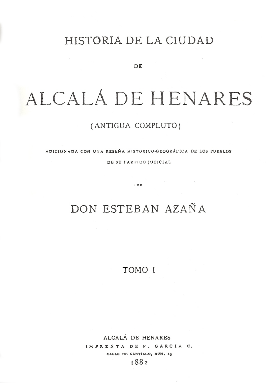 Portada del libro de Esteban Azaña: Historia de la ciudad de Alcalá de Henares. Publicado en 1882 en la imprenta de Federico García Carballo de Alcalá de Henares.